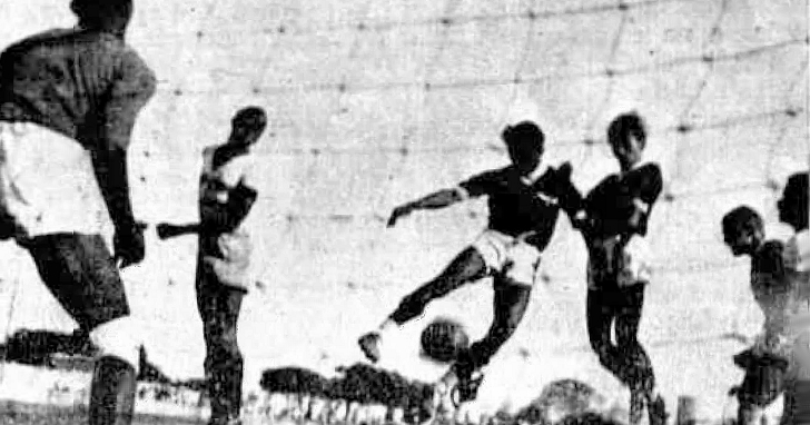 Primeiro Gol do Estádio Presidente Vargas (Fortaleza, CE), - Chinês (Ferroviário) - 1941-09-14